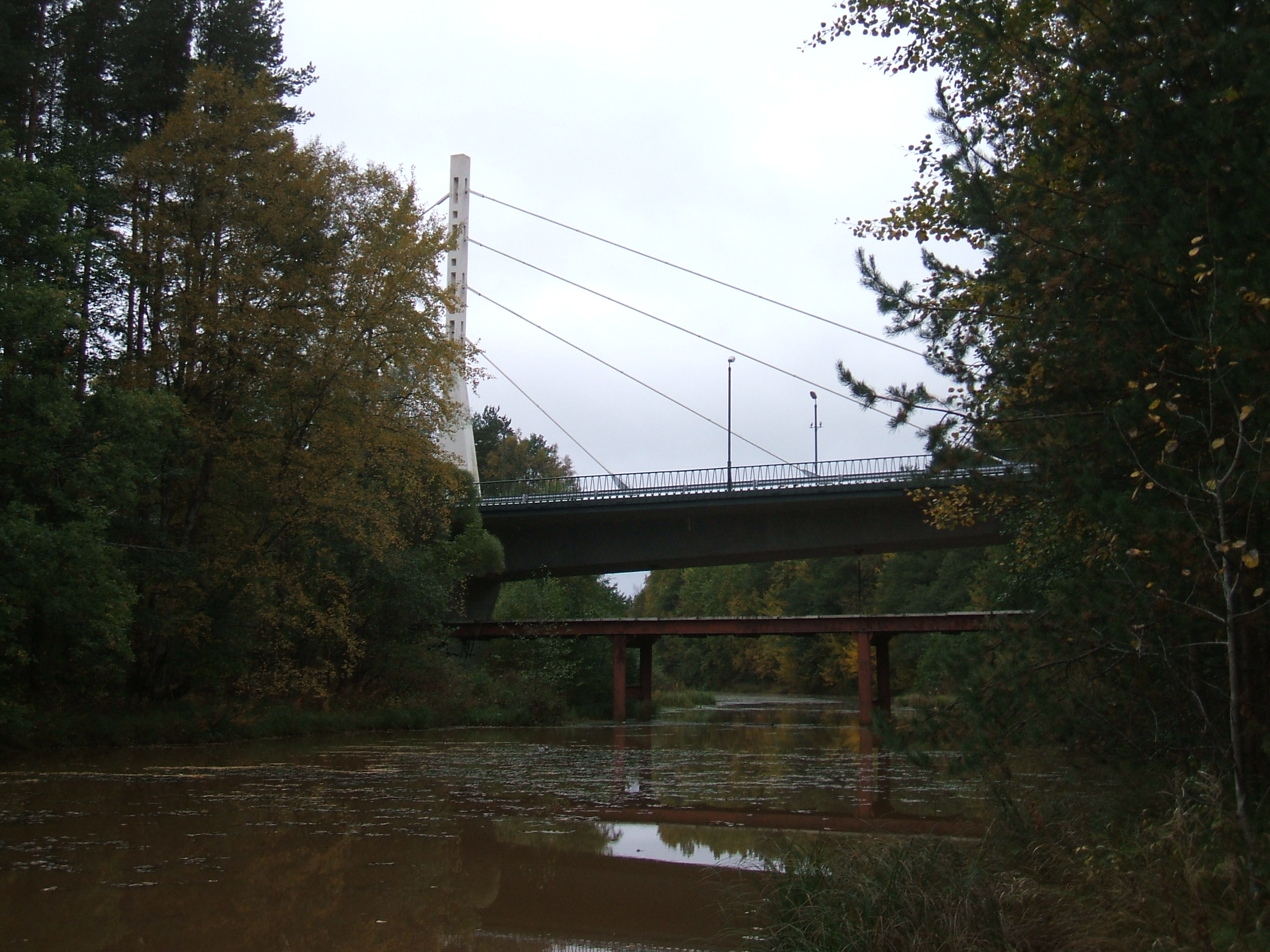 Мосты Курортного района СПб